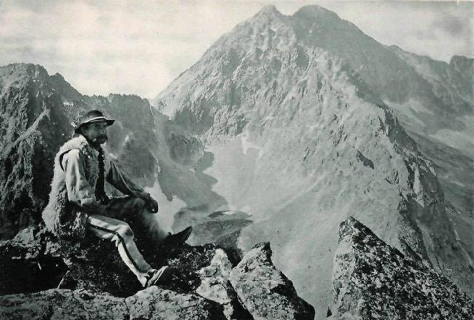 Klemens Bachleda prezývaný Klimek (* 1849, Kościelisko, Poľsko - † 6. - 7. august 1910) bol poľský goral, horský sprievodca, člen Tatrzańskiego Ochotniczego Pogotowia Ratunkowego, prvý poľský horský záchranár, ktorý tragicky zahynul idúc na pomoc človeku v Tatrách. Medzi jeho prvovýstupy patrili výstupy na Bradavicu (1892), Ganek (1895), ktorý bol dlho považovaný za nedostupný, Rumanov štít (1904), Druhý Mních (1904) a dalšie.